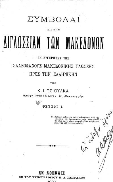 Συμβολαί εις την διγλωσσίαν των Μακεδόνων εκ συγκρίσεως της σλαυοφανούς μακεδονικής γλώσσης προς την ελληνικήν / Υπό Κ. Ι. Τσιούλκα.